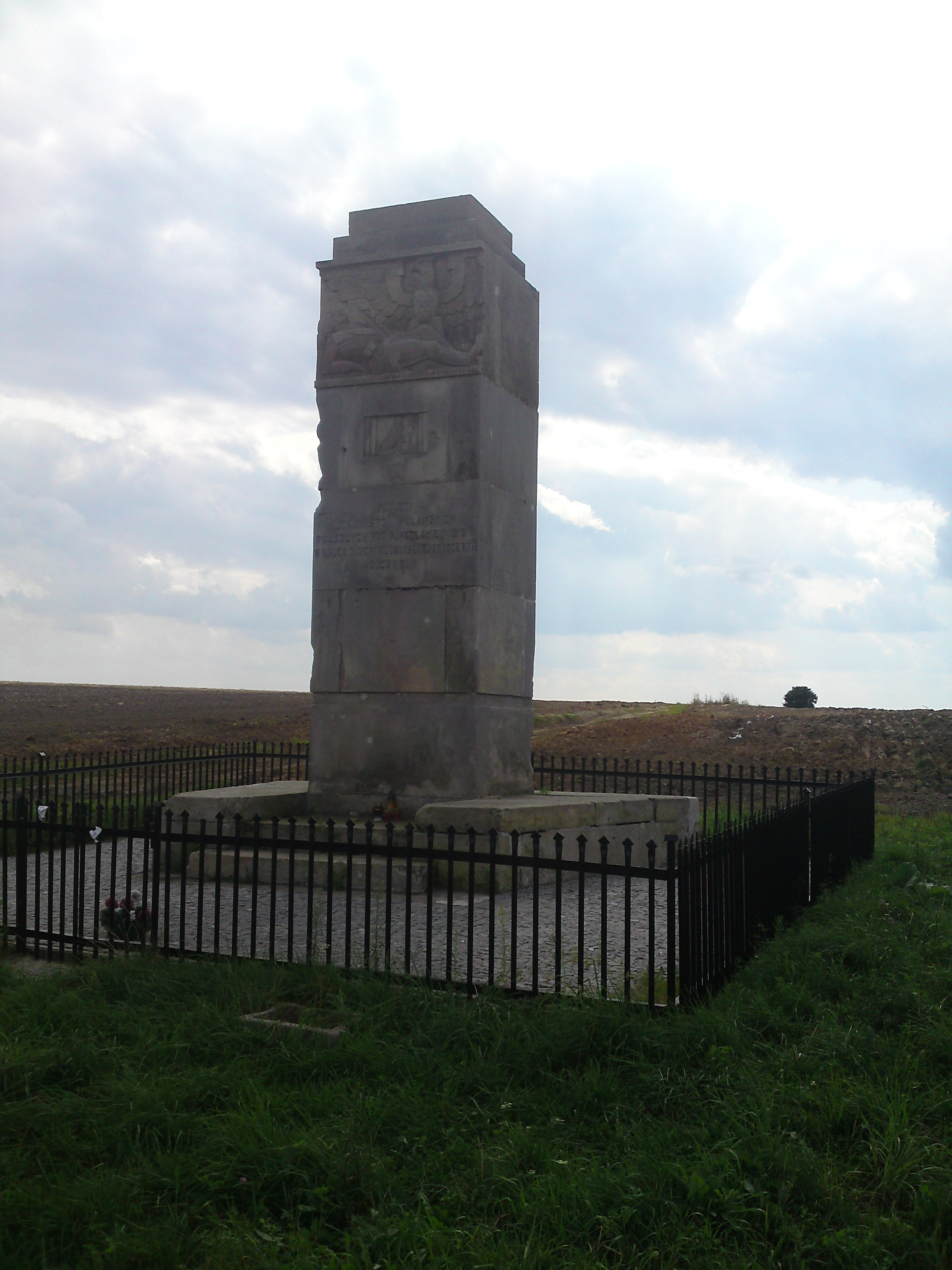 Pomnik (obelisk) Poległych Żołnierzy Legionu Puławskiego w Pakosławiu (zabytek nr A/408)